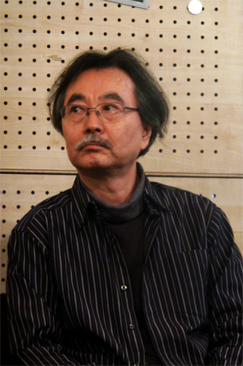 Jirō Taniguchii at Paris.